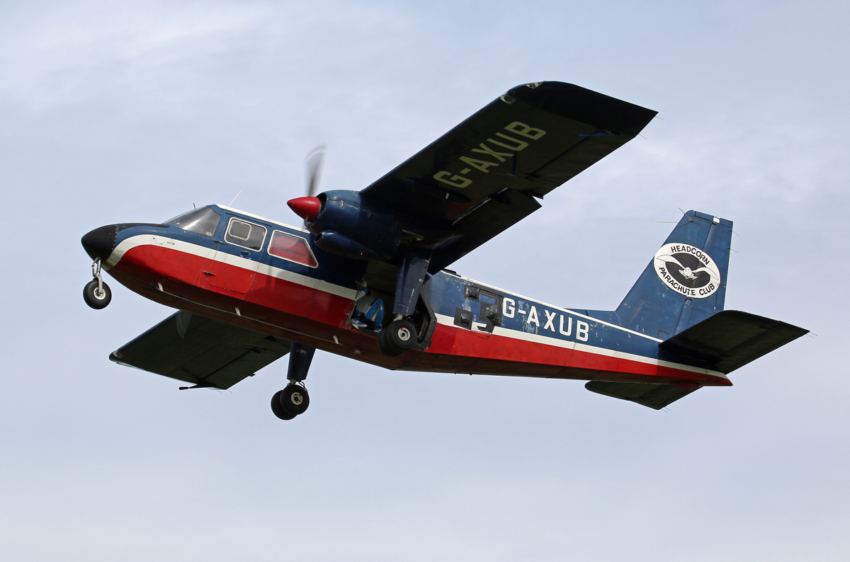 Redlands Farm 30 Aug 2014